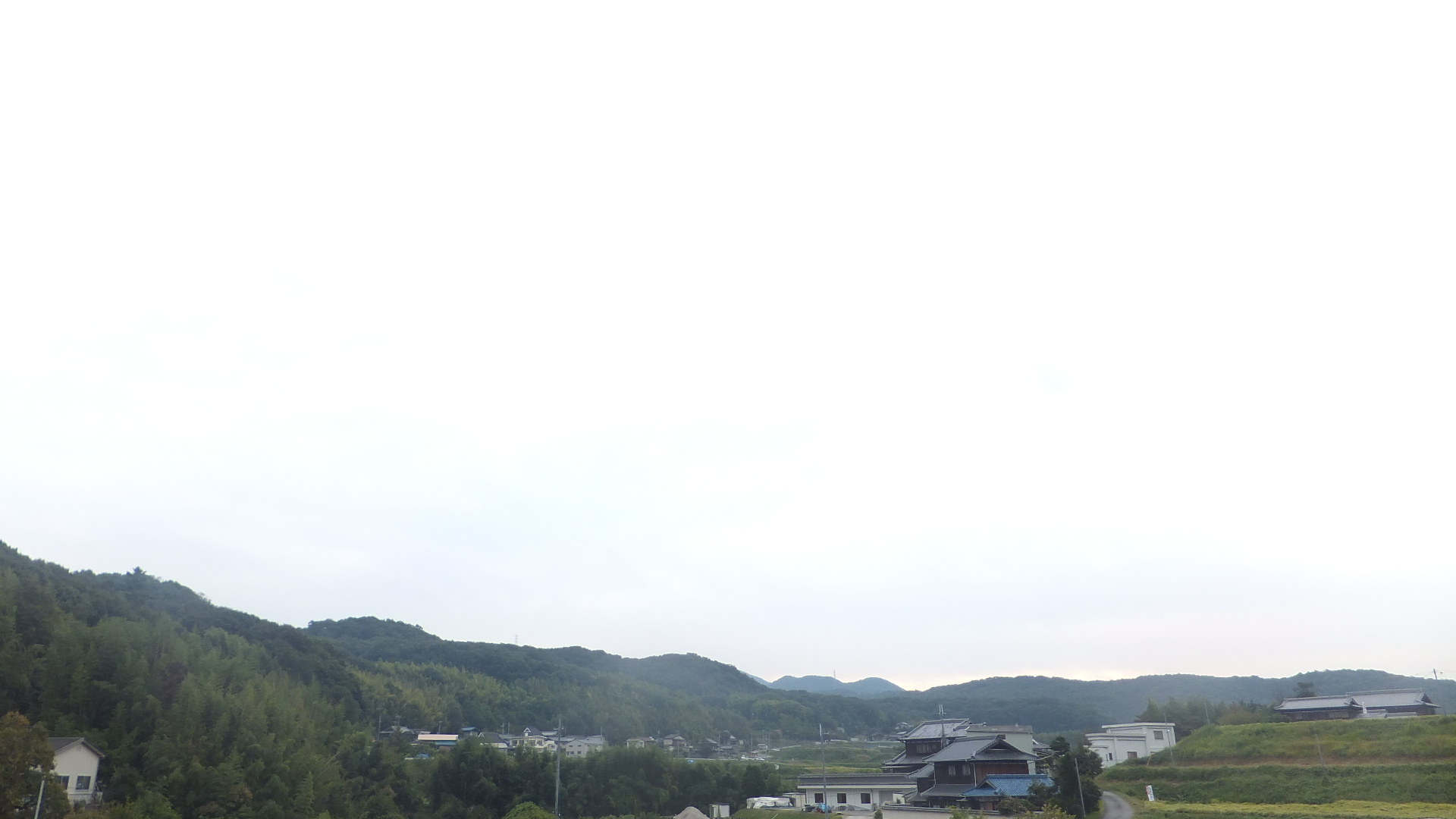 兵庫県三木市志染町三津田